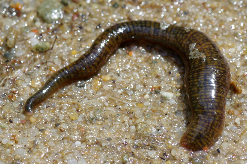 Pijawka (Erpobdella octoculata)